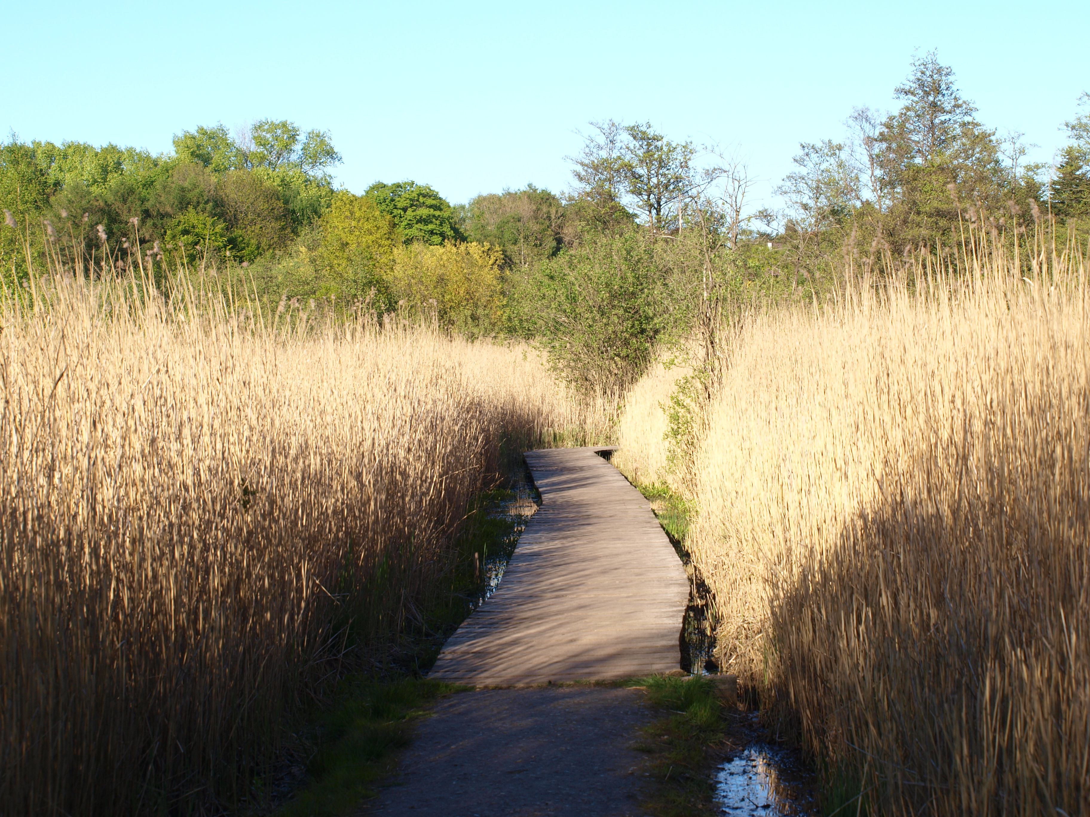 Weg durch den Schilfgürtel am Tröndel-See, Naturschutzgebiet „Tröndelsee und Umgebung“ in Kiel